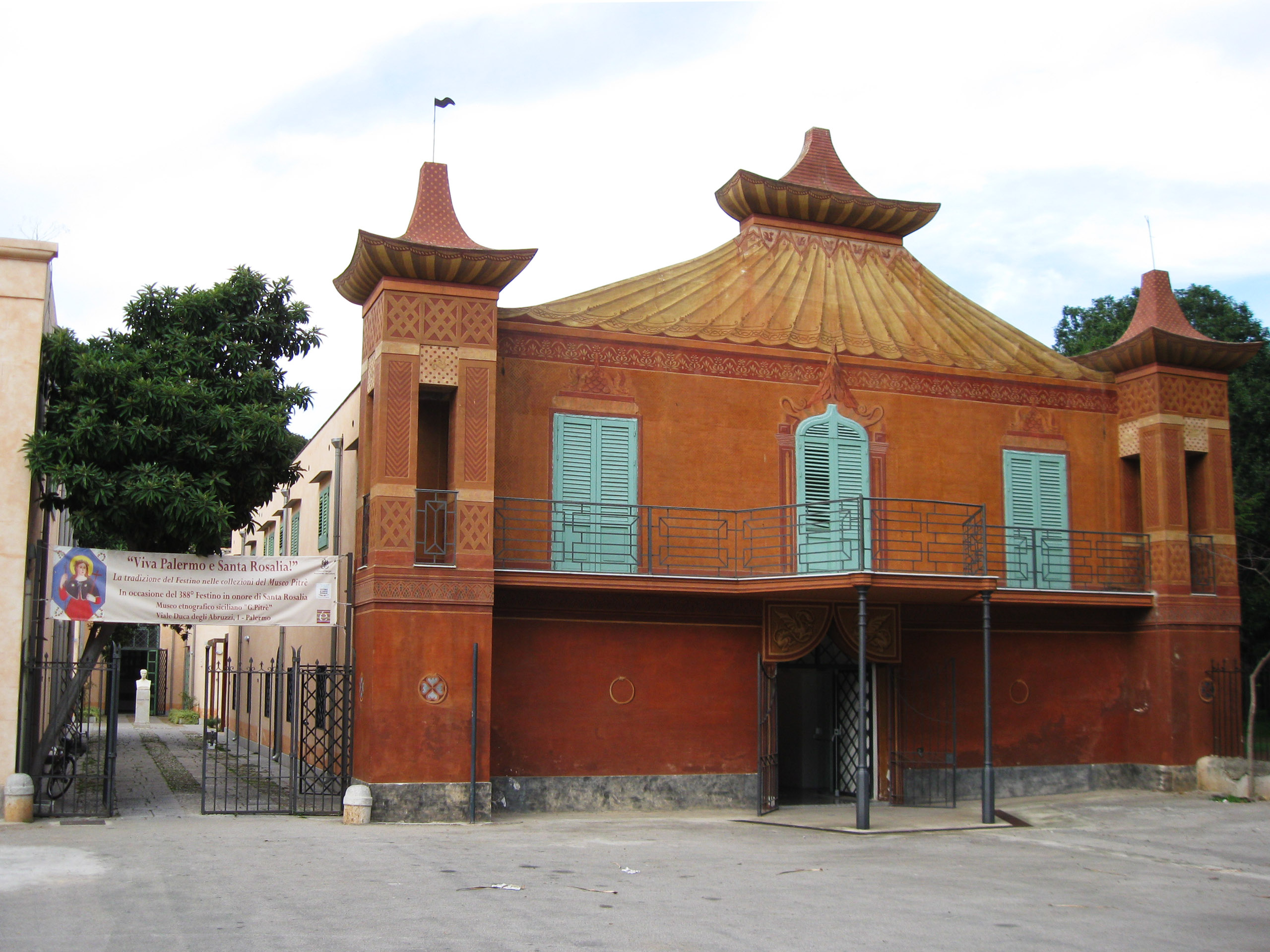 Ingresso del Museo Pitrè a Palermo (Italy)